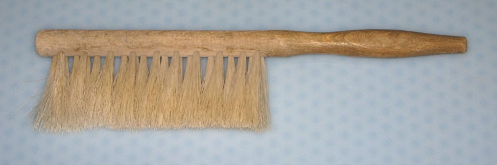 Broso por balai segpolvon dum serurista kaj meblista laboro. La foto estis farita de mi mem.